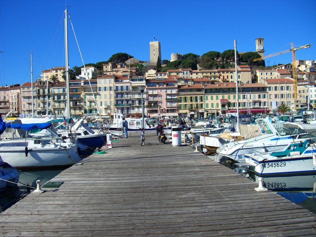 il s'agit du Vieux Port de Cannes qui est une référence touristique dans la ville